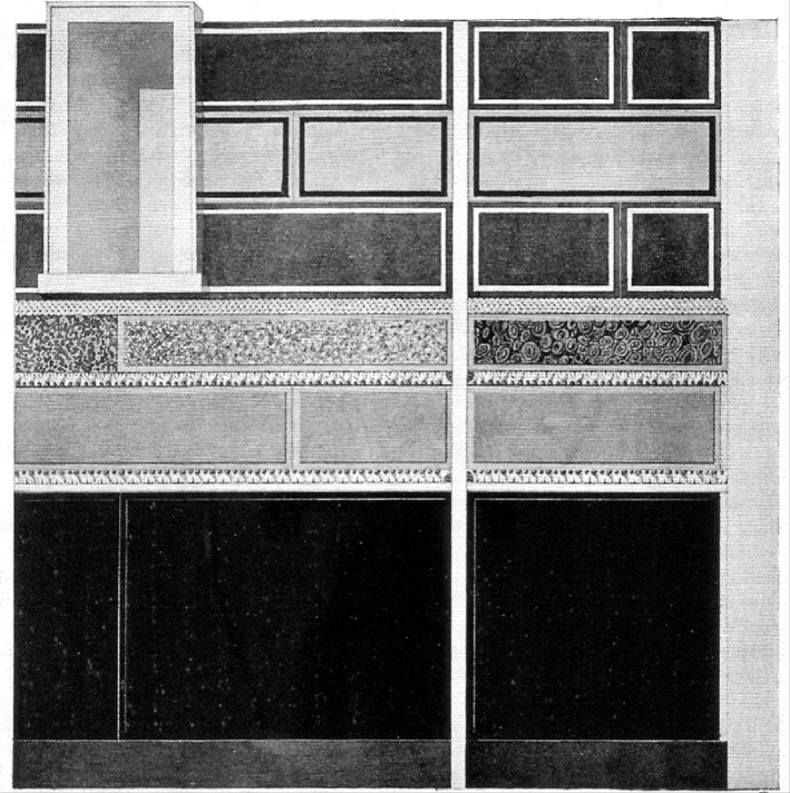 Delos, Haus des Dionysos